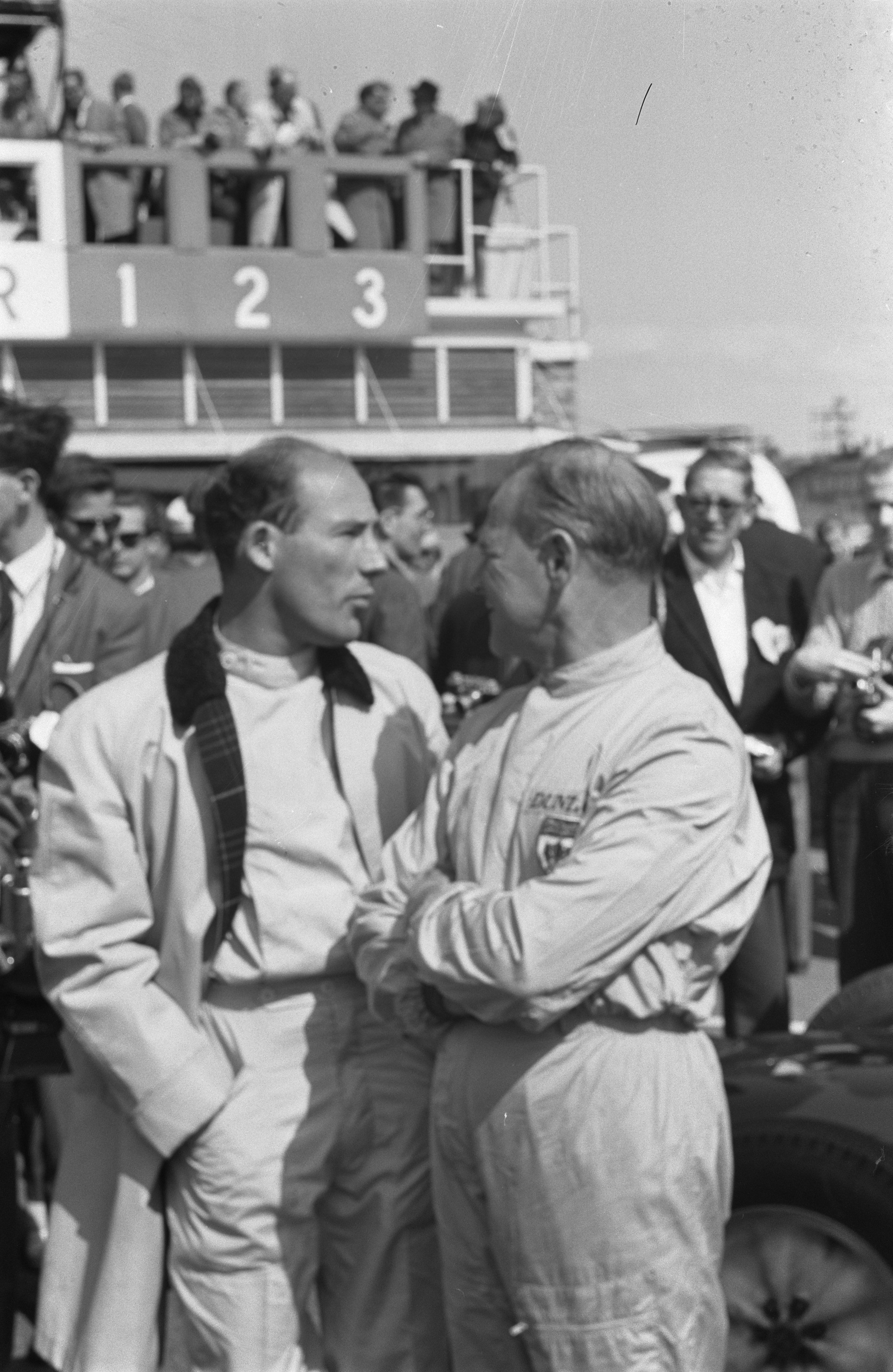 Collectie / Archief : Fotocollectie Anefo Reportage / Serie : Grand Prix Zandvoort 1961 Beschrijving : Het rennerskwartier. Stirling Moss (links) in gesprek met Innes Ireland Datum : 22 mei 1961 Locatie : Noord-Holland, Zandvoort Trefwoorden : auto's, coureurs, sport Persoonsnaam : Ireland Innes, Moss, Stirling Fotograaf : Harry Pot / Anefo Auteursrechthebbende : Nationaal Archief Materiaalsoort : Negatief (zwart/wit) Nummer archiefinventaris : bekijk toegang 2.24.01.05 Bestanddeelnummer : 912-5052